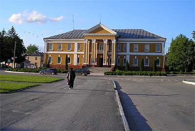 Дунаєвецький районний відділ освіти